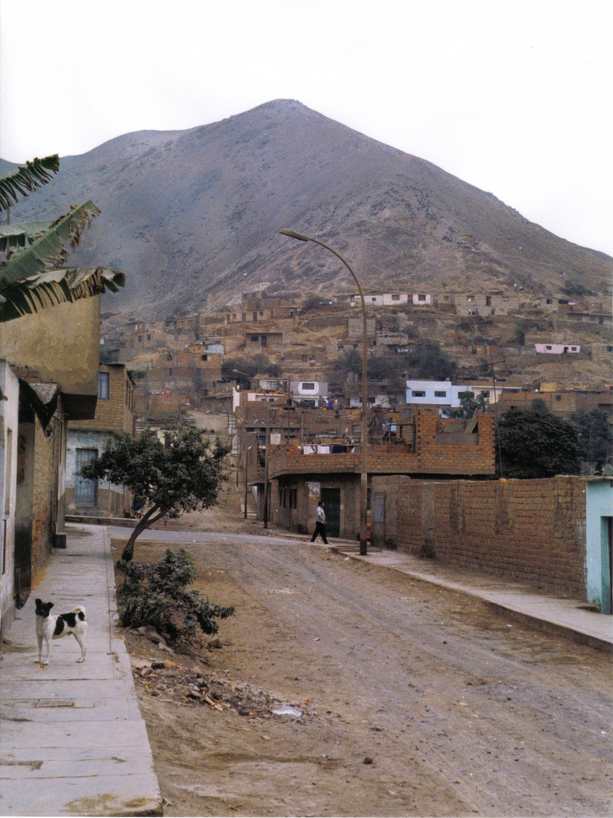 Straße in der informellen Siedlung Comas, 14 Kilometer vor Lima.